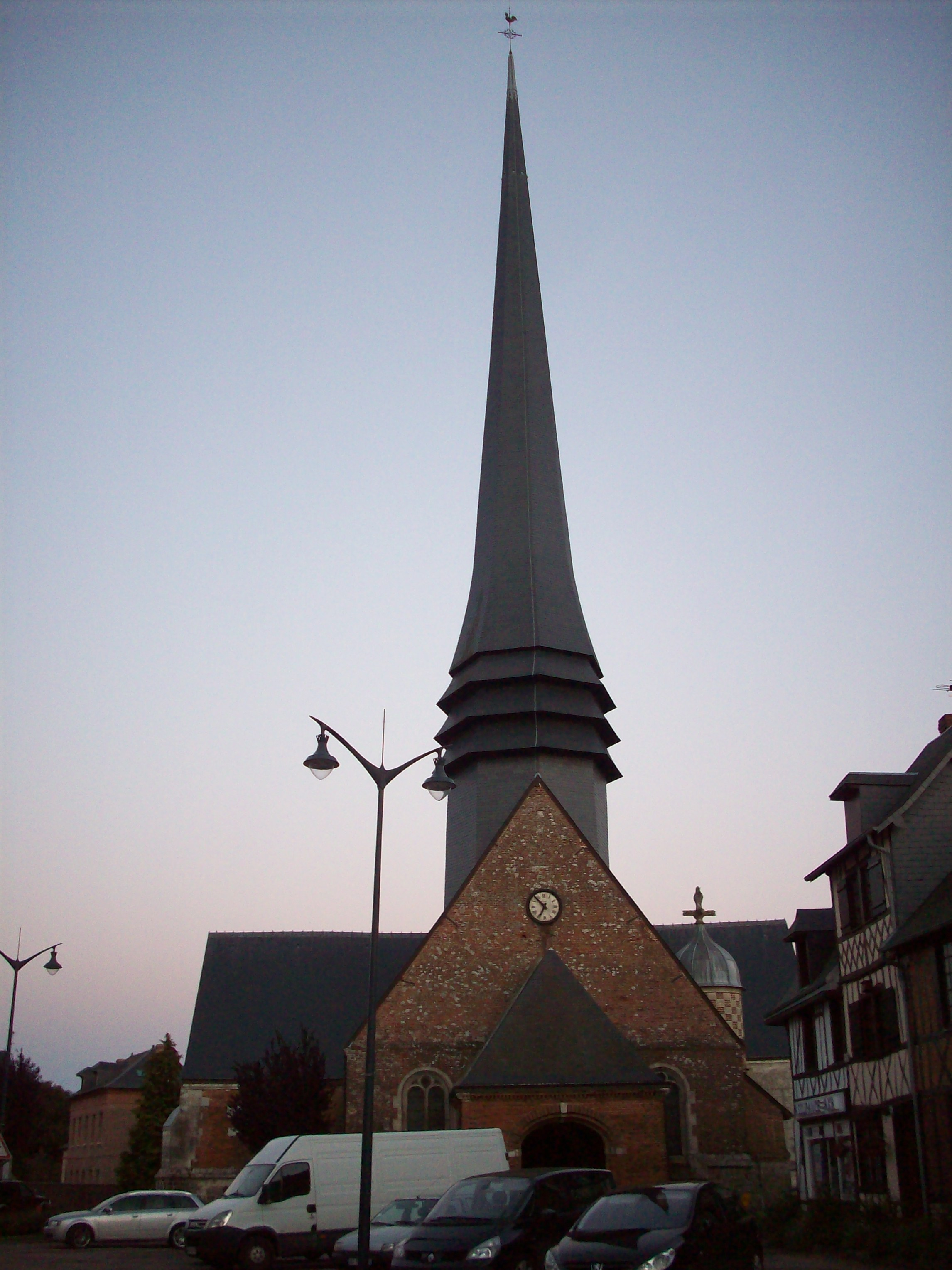 Eglise Saint-Eustache de La Feuillie. Il possède le clocher ardoisé le plus haut de France.